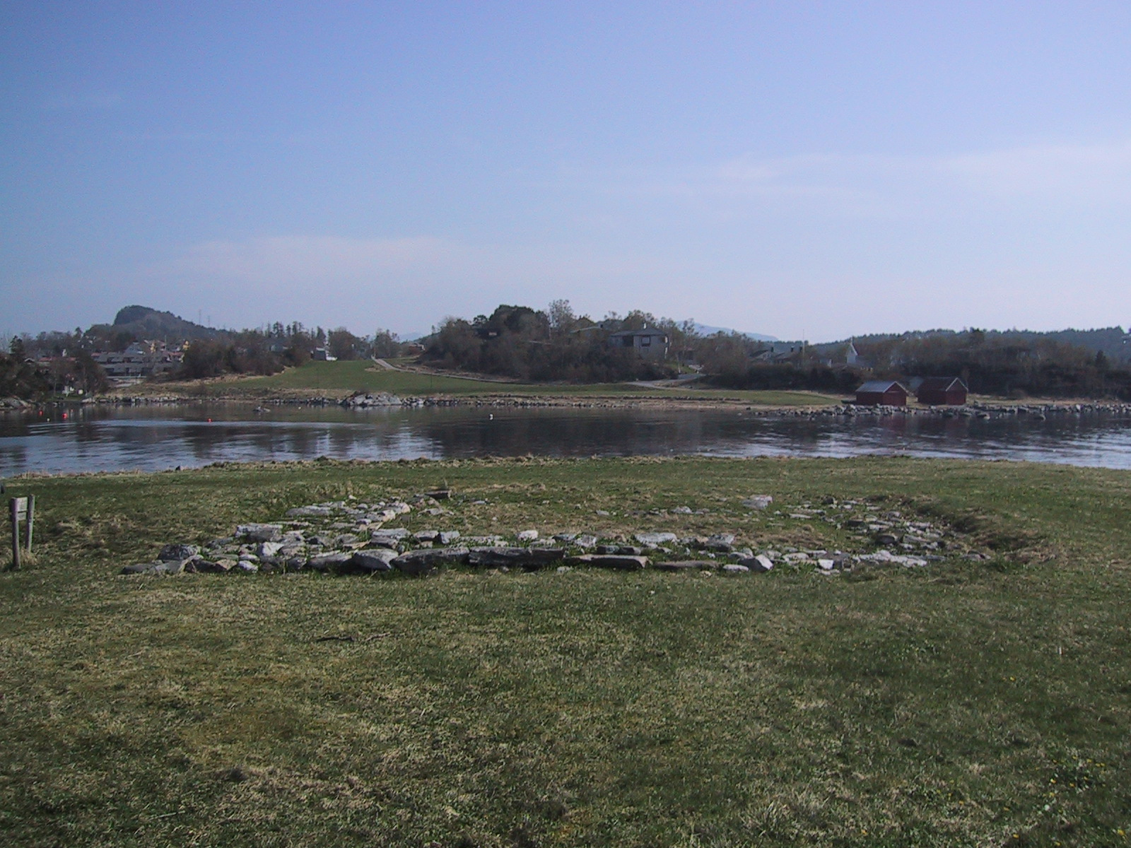 Margaretakirkens ruin i Borgund, Ålesund. Foto: Dag Bertelsen, fra Lokalhistoriewiki.